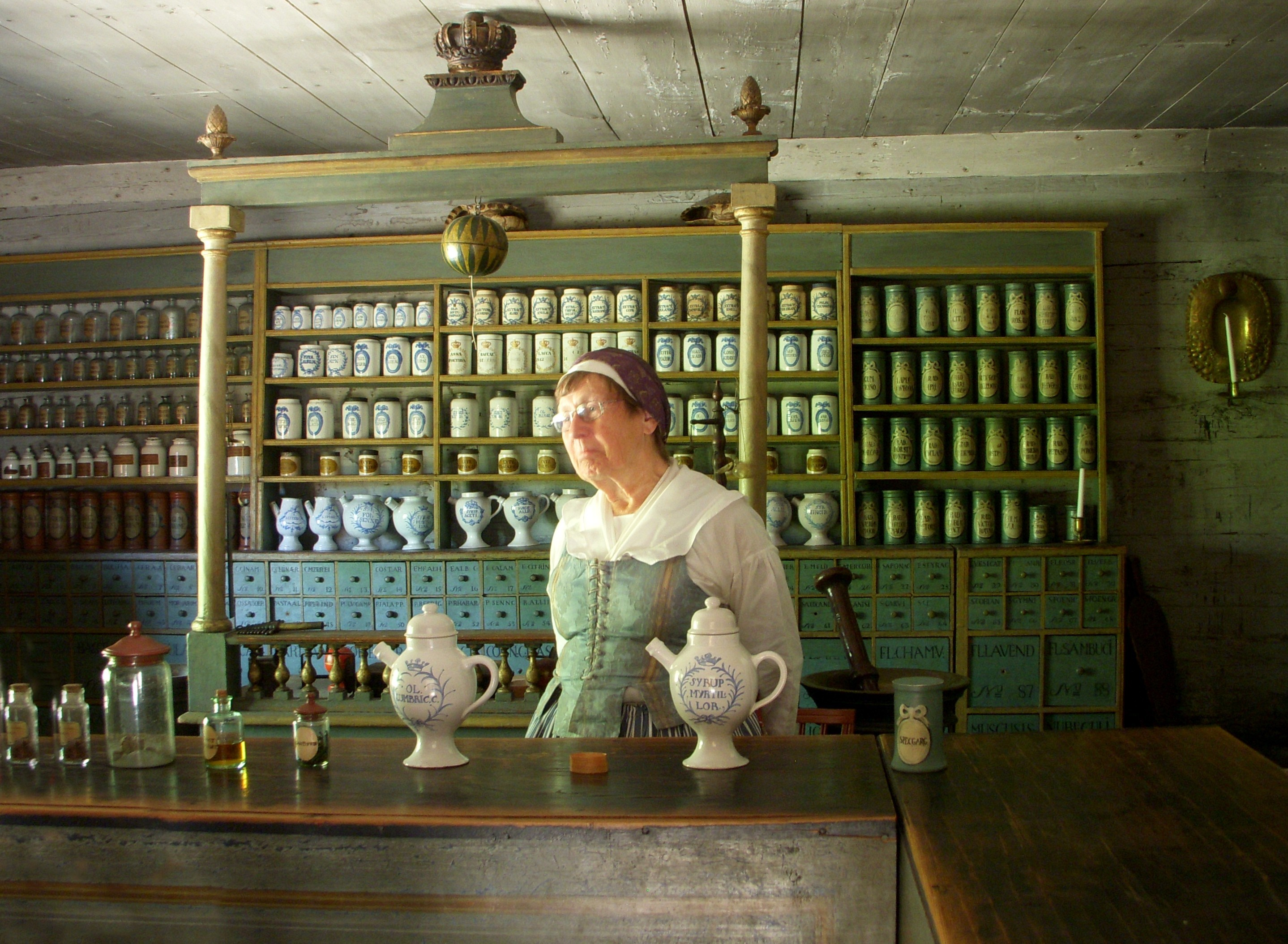 "Apoteket Kronan" på Skansen, Stockholm. Inredningen flyttas till Skansen från Apotekshuset, Drottningholm.